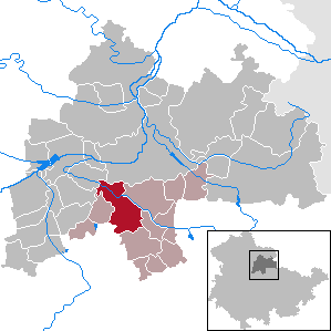 Großrudestedt in Thuringia - District Sömmerda